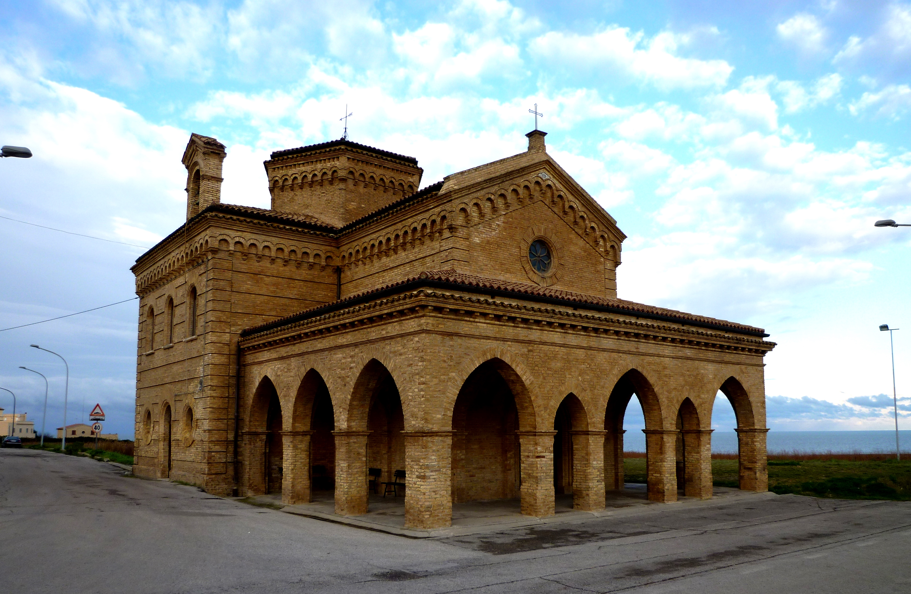 Chiesa di Santa Maria di Punta Penna, Vasto, Chieti.